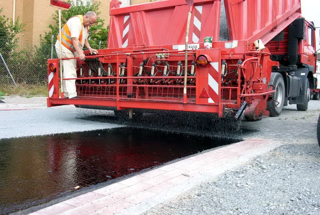 Spreader